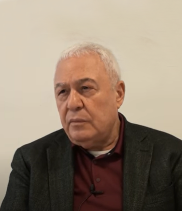 Celal Doğan VOA'ya röportaj verirken